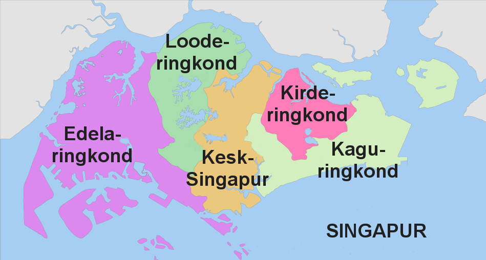 Singapuri ringkonnad